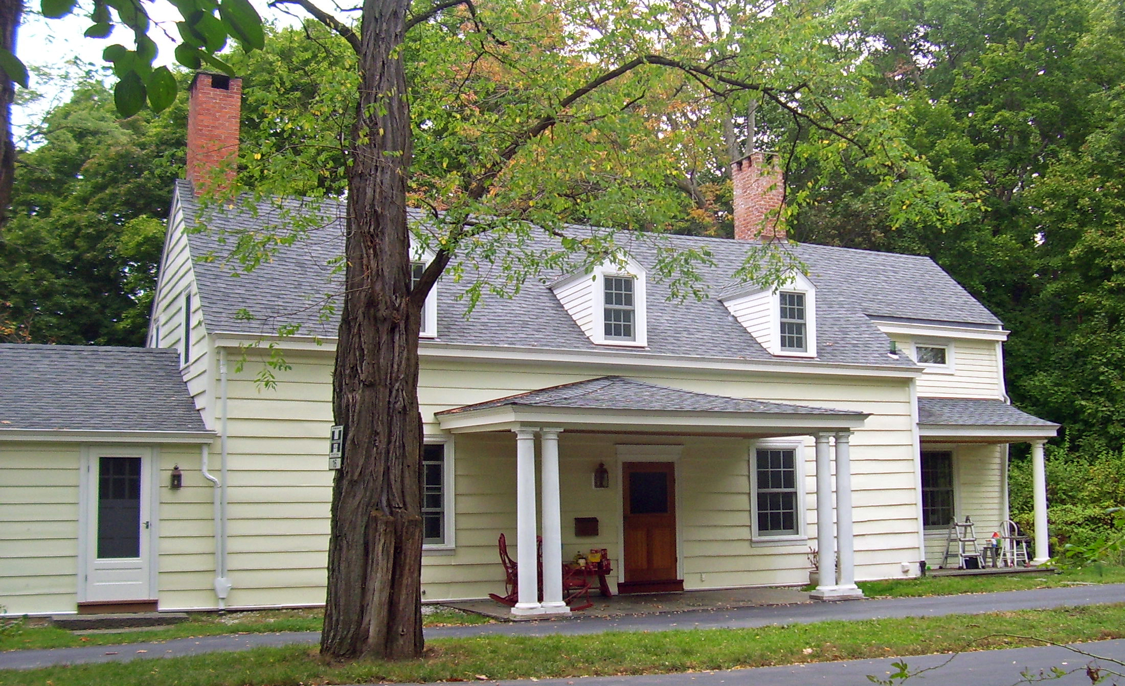 Bogardus-DeWindt House in Beacon, NY USA